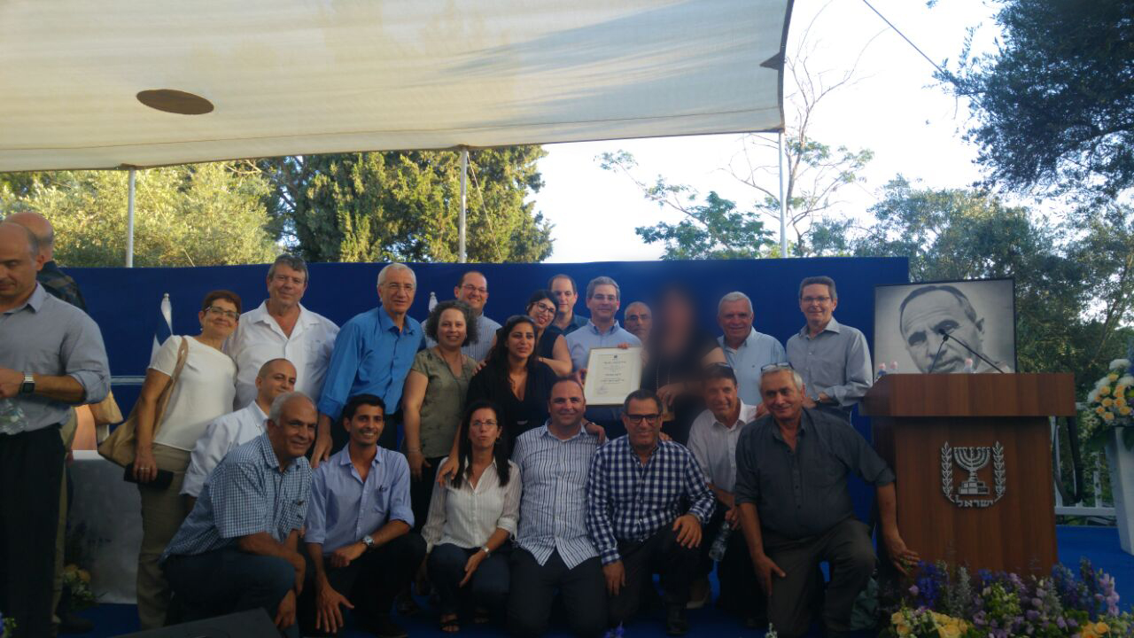 טקב פרס ביטחון ישראל על חלקה של תעש בפיתוח מערכת חץ 3